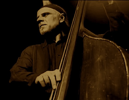 Photo prise avec mon appareil lumix